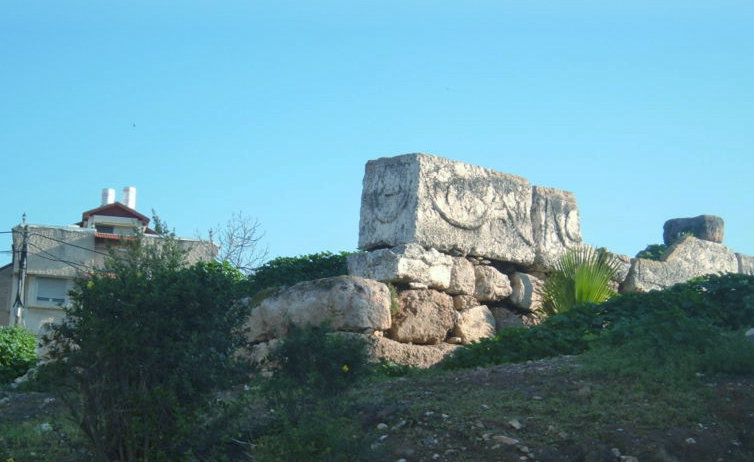 תל העתיקות בעפולה